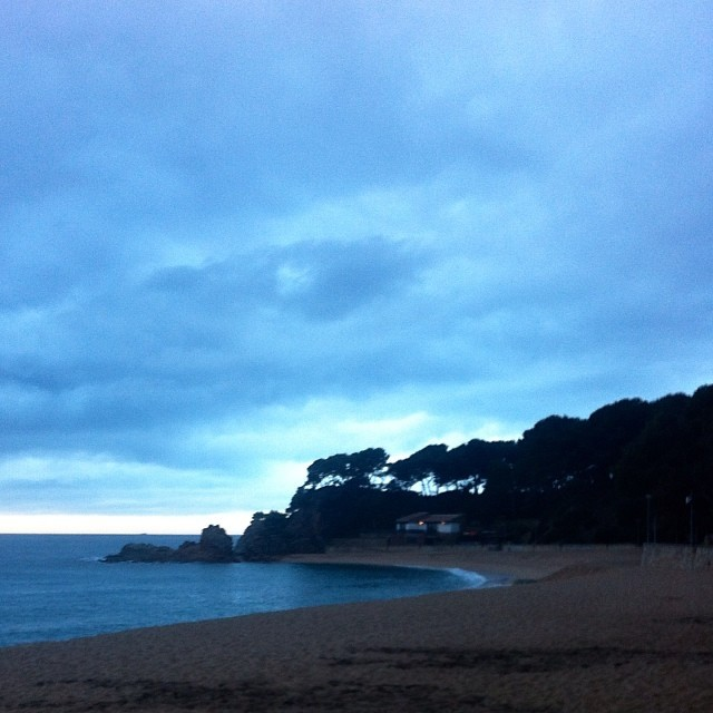 Fenals Beach